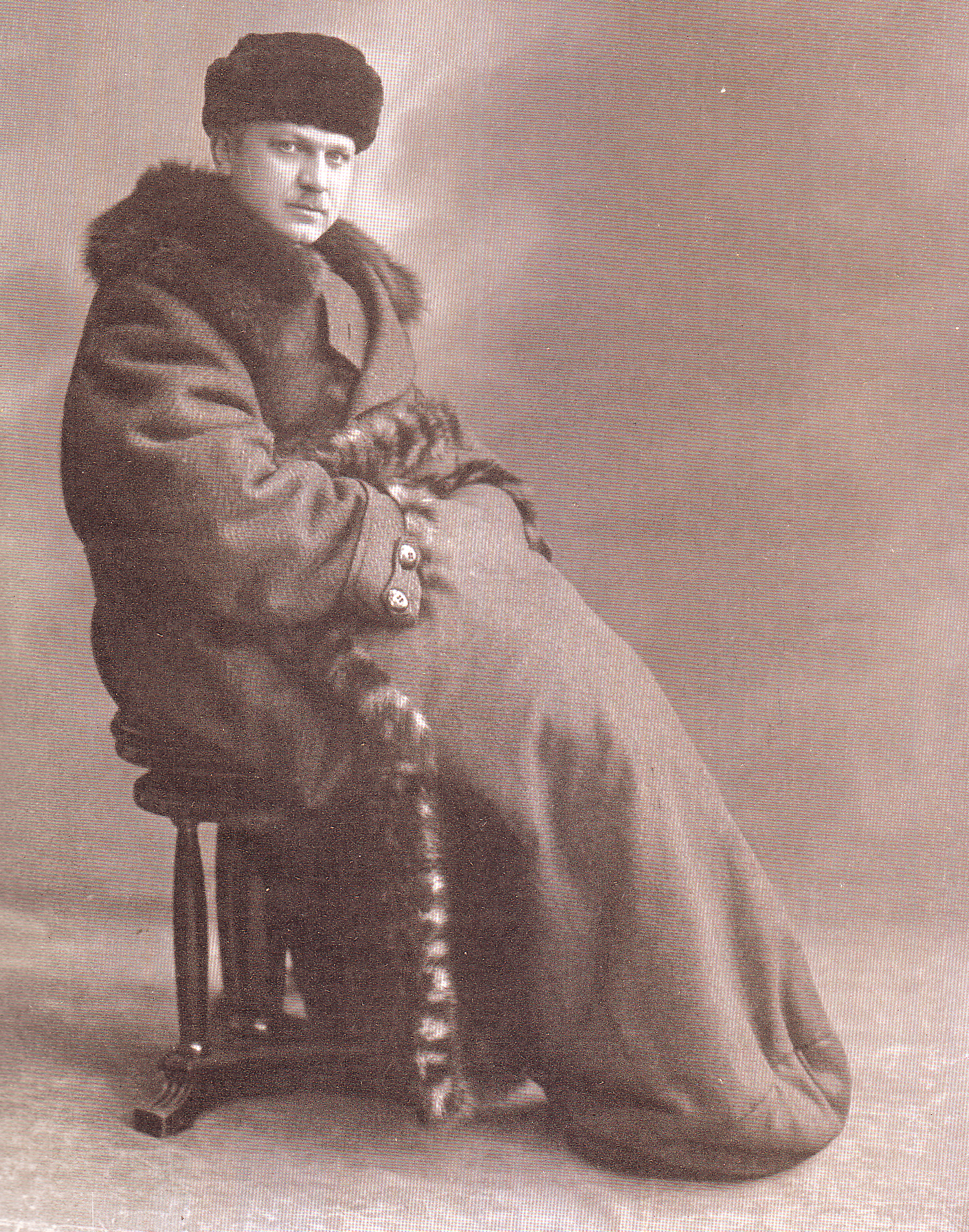 Stöckig & Co., Dresden, Pelzmode-Katalog, wahrscheinlich 1912. Fuß-Sack. Aus grauem Filz, mit Schuppen-Schweifen eingefaßt. Gefüttert mit prima Lammfell. 2 große Wärmtaschen. Lederboden.